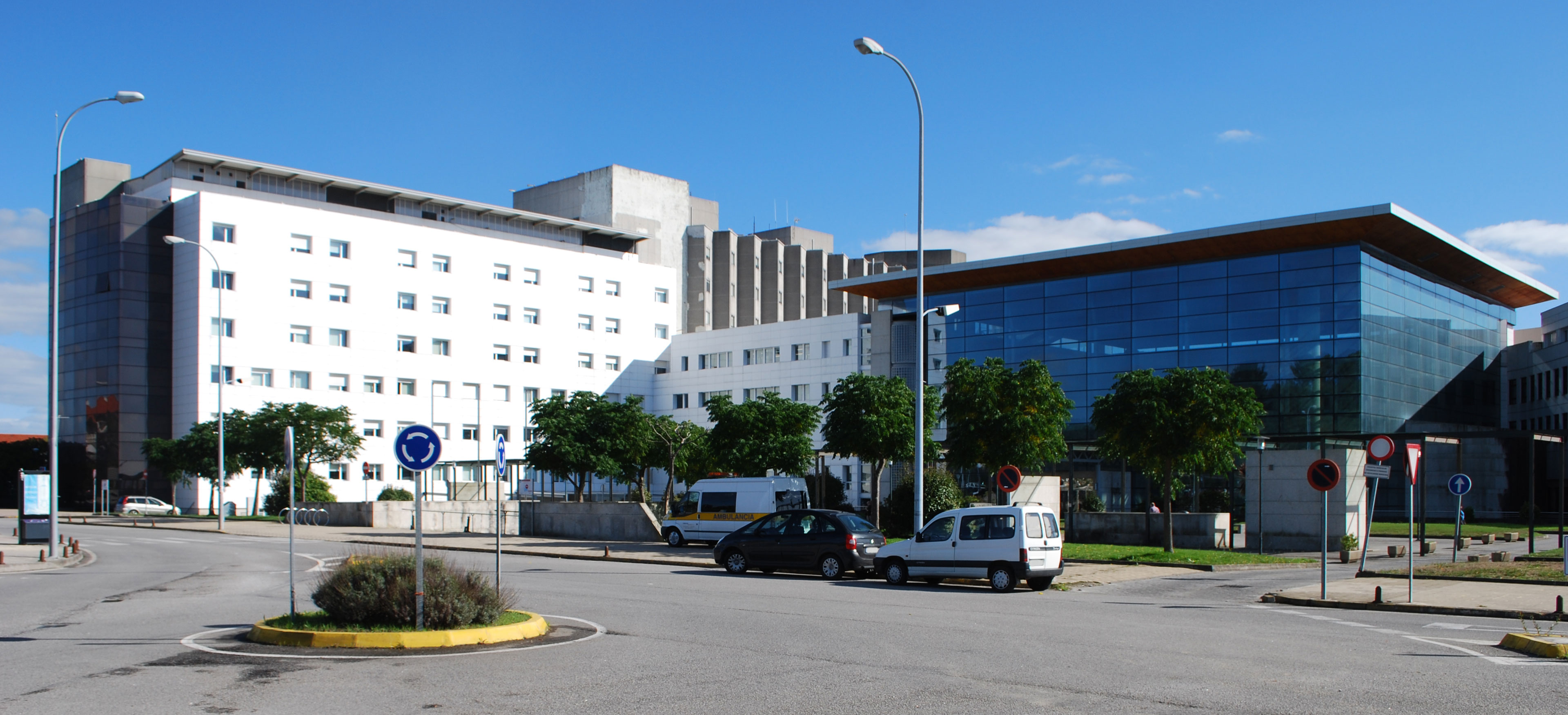 Sergas Hospital Arquitecto Marcide Ferrol A Coruña Galiza Spain